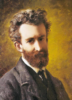 Портрет Миклухо-Маклая кисти Константина Маковского